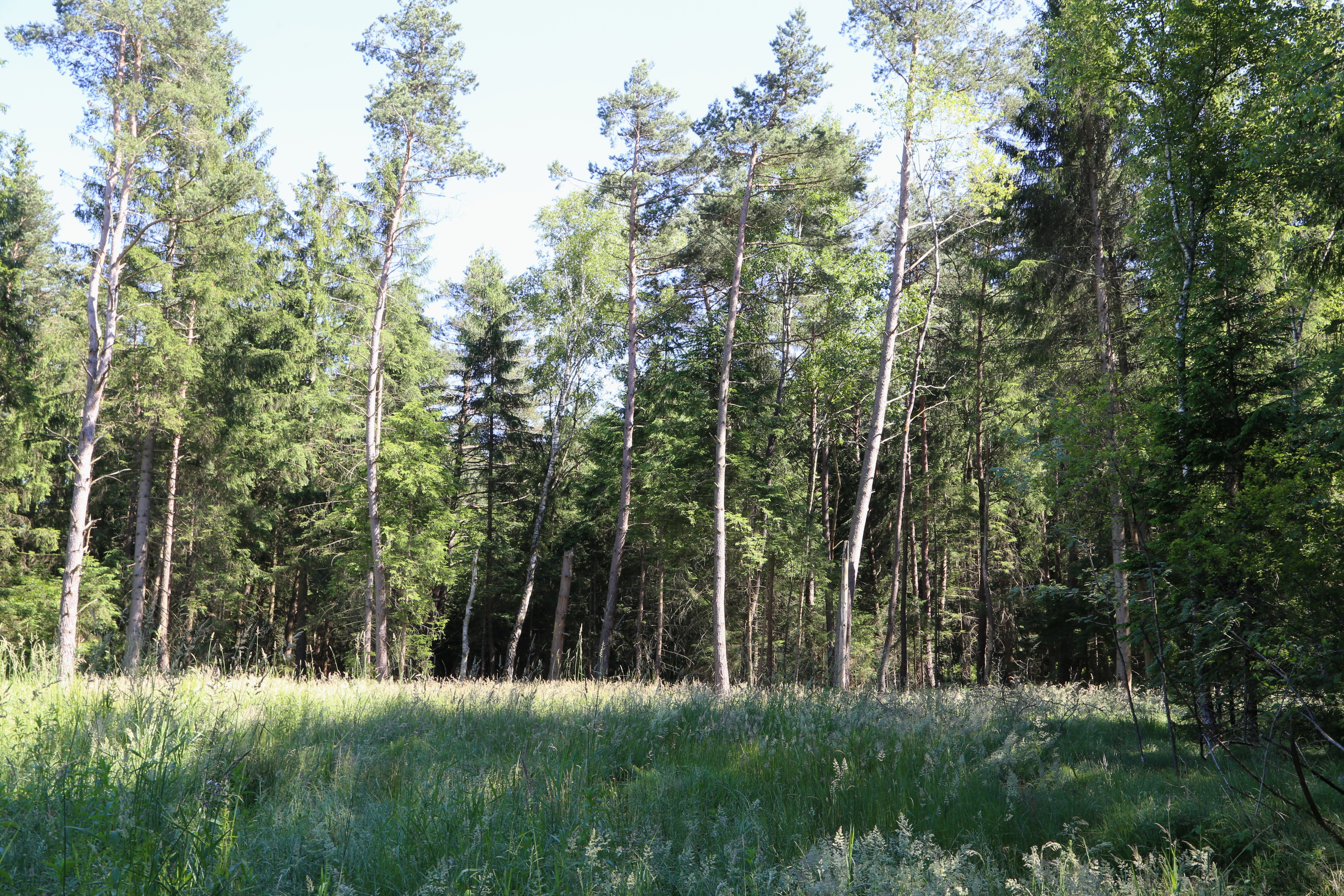 Landschaftsschutzgebiet LSG-00529.01 Kirchseeoner Moos, Kirchseeon